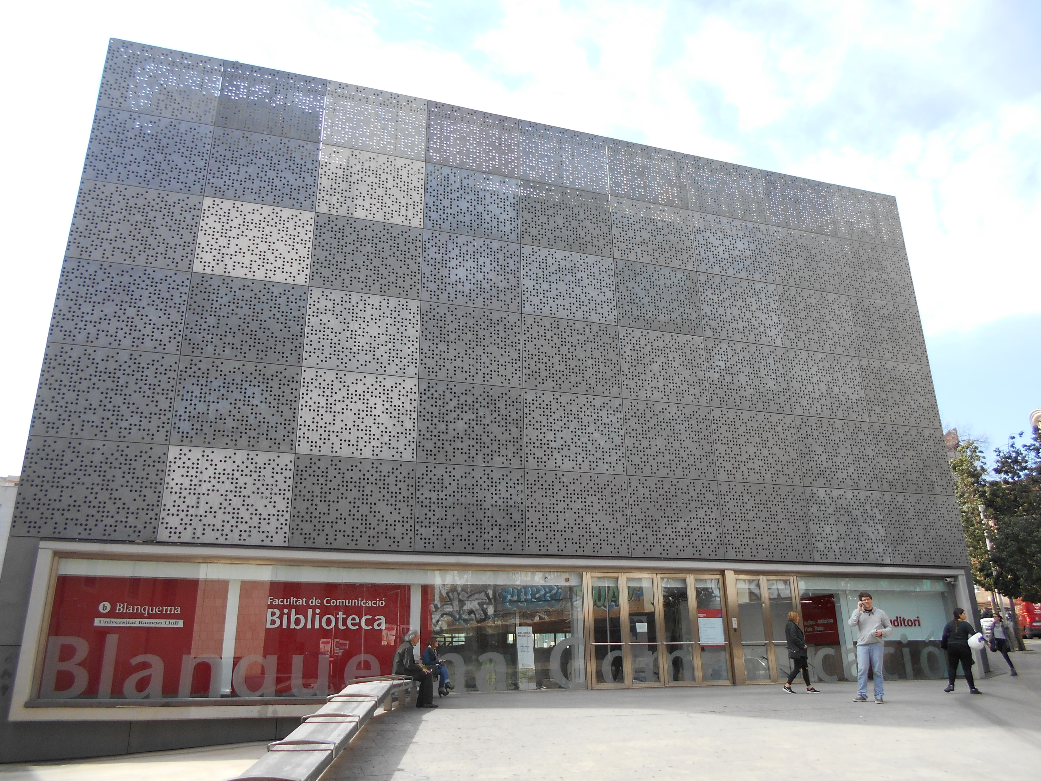 Biblioteca de la Facultad de Ciencias de la Comunicación “Blanquerna” de la Universidad Ramon Llull (1994-1996), de Daniel Freixes, Vicente Miranda, Vicenç Bou y Eulàlia González.